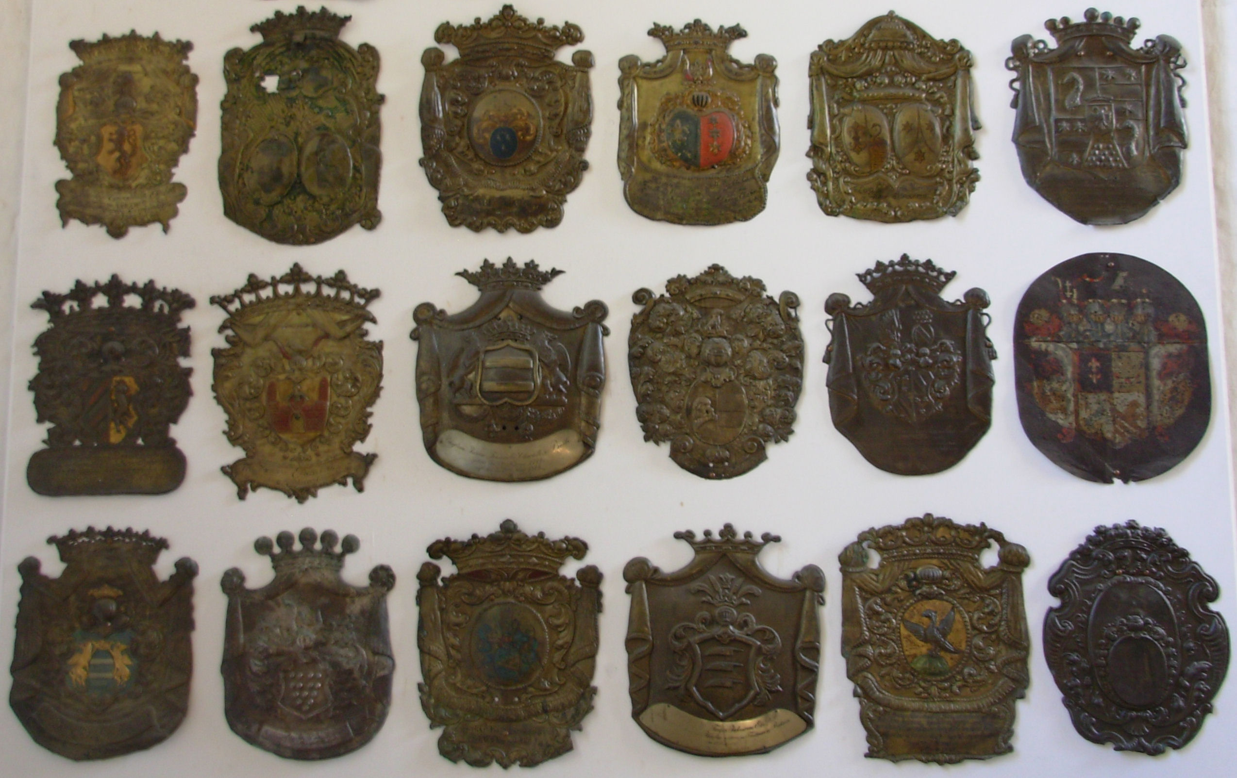 Wappen verstorbener Konventualinnen in der Kirche des St. Johannis-Klosters vor Schleswig